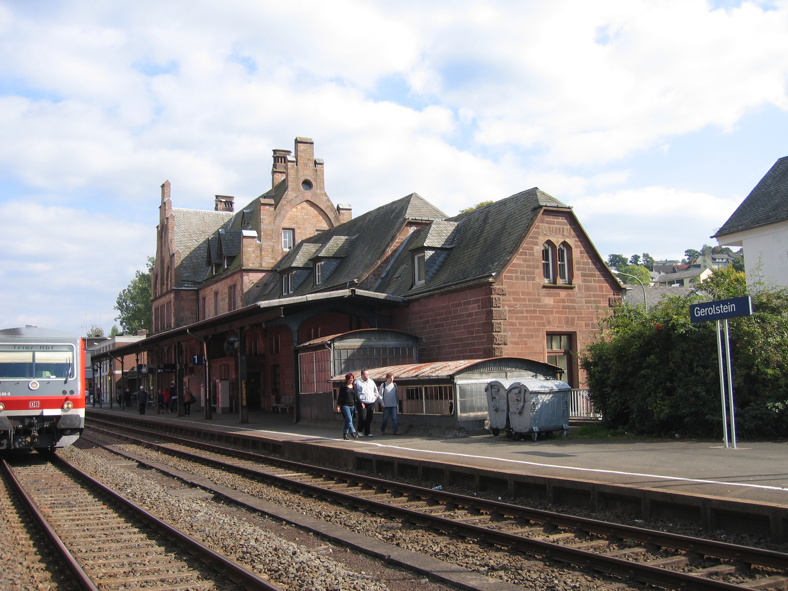 Der Bahnhof Gerolstein der Eifelbahn